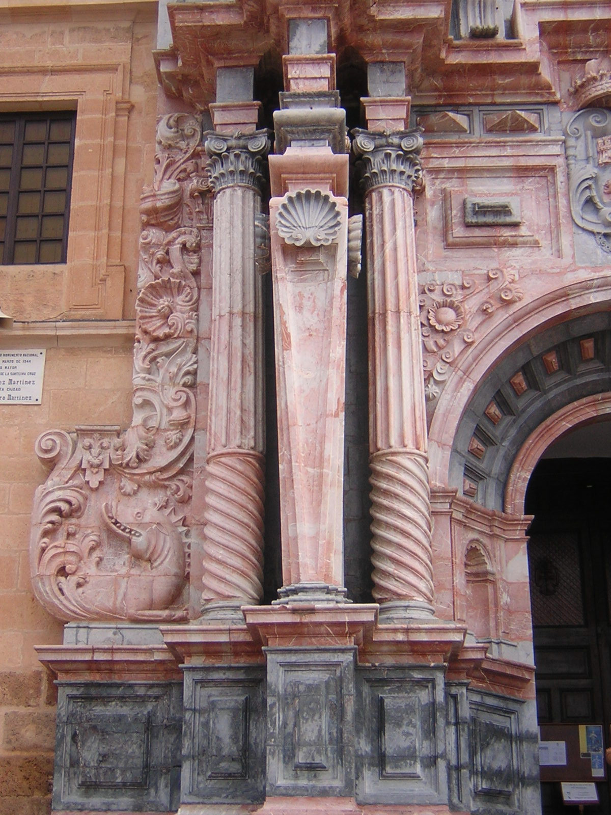 One of the Castle of the Vera Cruz ("authentic cross") baroque façade columns, in Caravaca de la Cruz (Region of Murcia) Una columna de la fachada del Santuario de la Vera Cruz, en Caravaca de la Cruz (Región de Murcia) Une des colonnes de la façade baroque du sanctuaire de la Vera Cruz, à Caravaca de la Cruz (Communauté Autonome de Murcie)